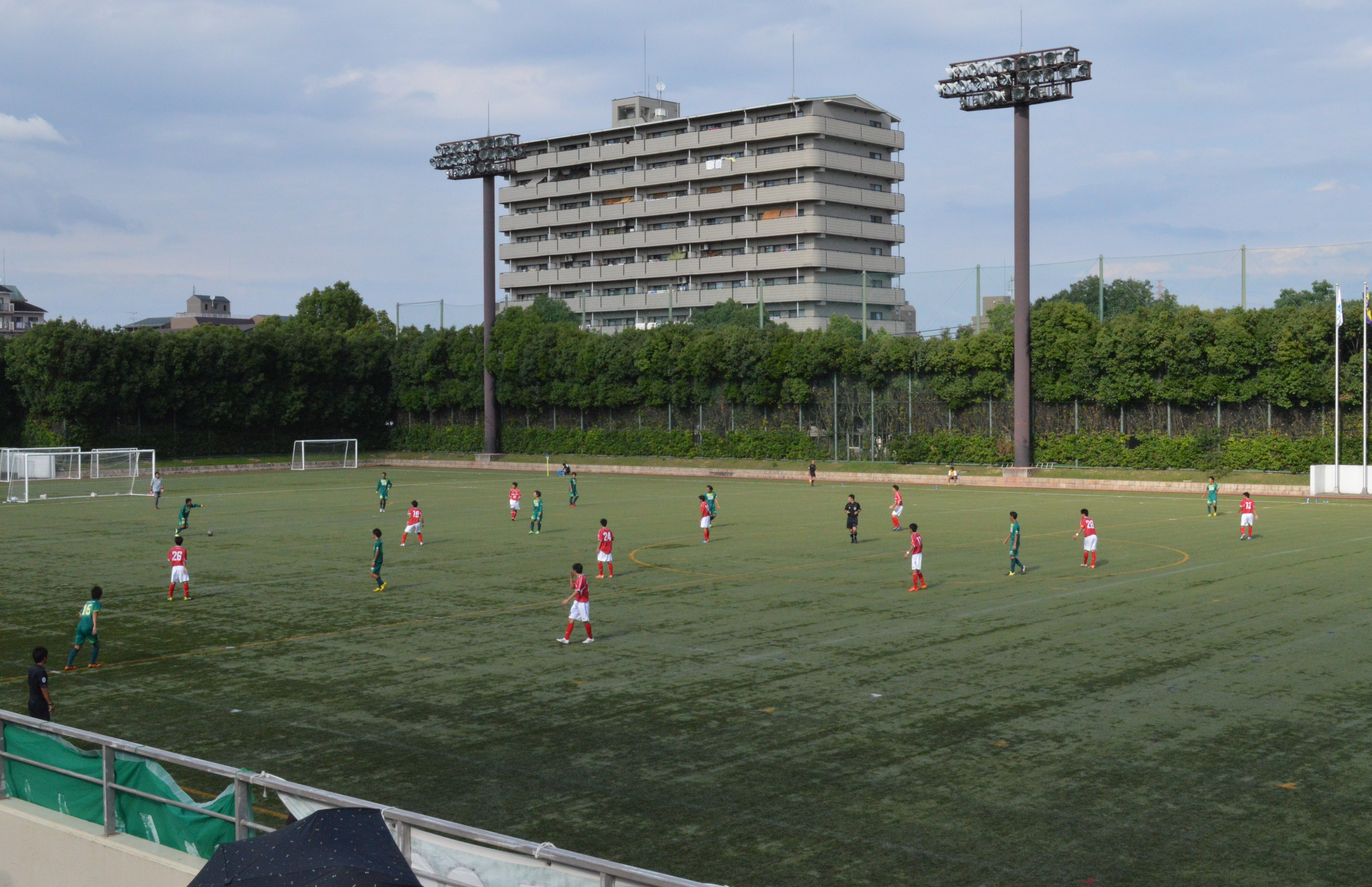 鶴見緑地球技場